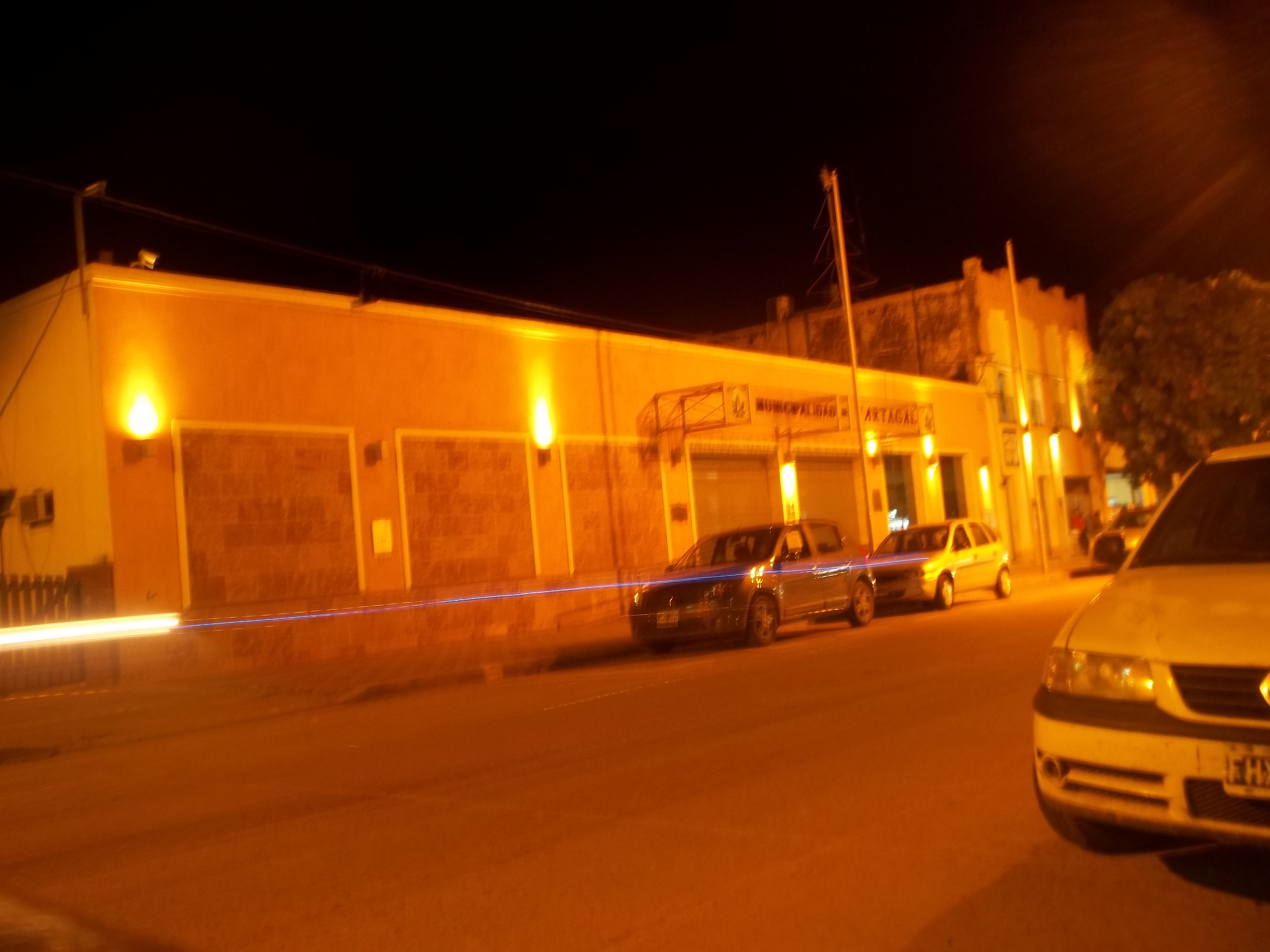 Sede de la Municipalidad de Tartagal, Argentina.